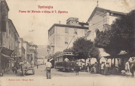 Ventimiglia, tram in piazza del mercato